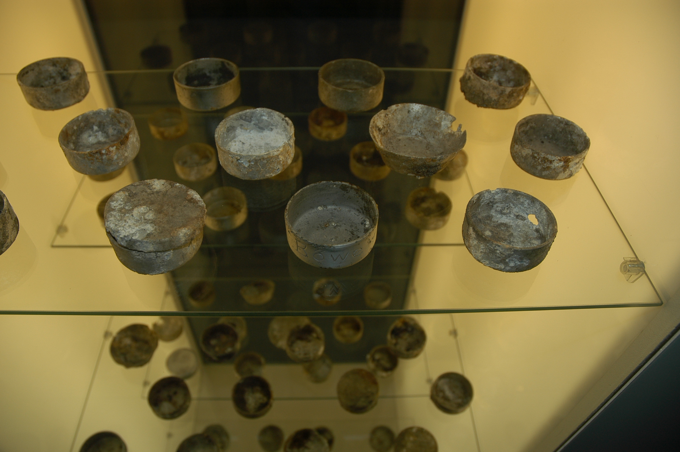 Speziallager Nr. 7 Sachsenhausen: Ausstellung Bittersüß: Zuckerdosen in einer Vitrine